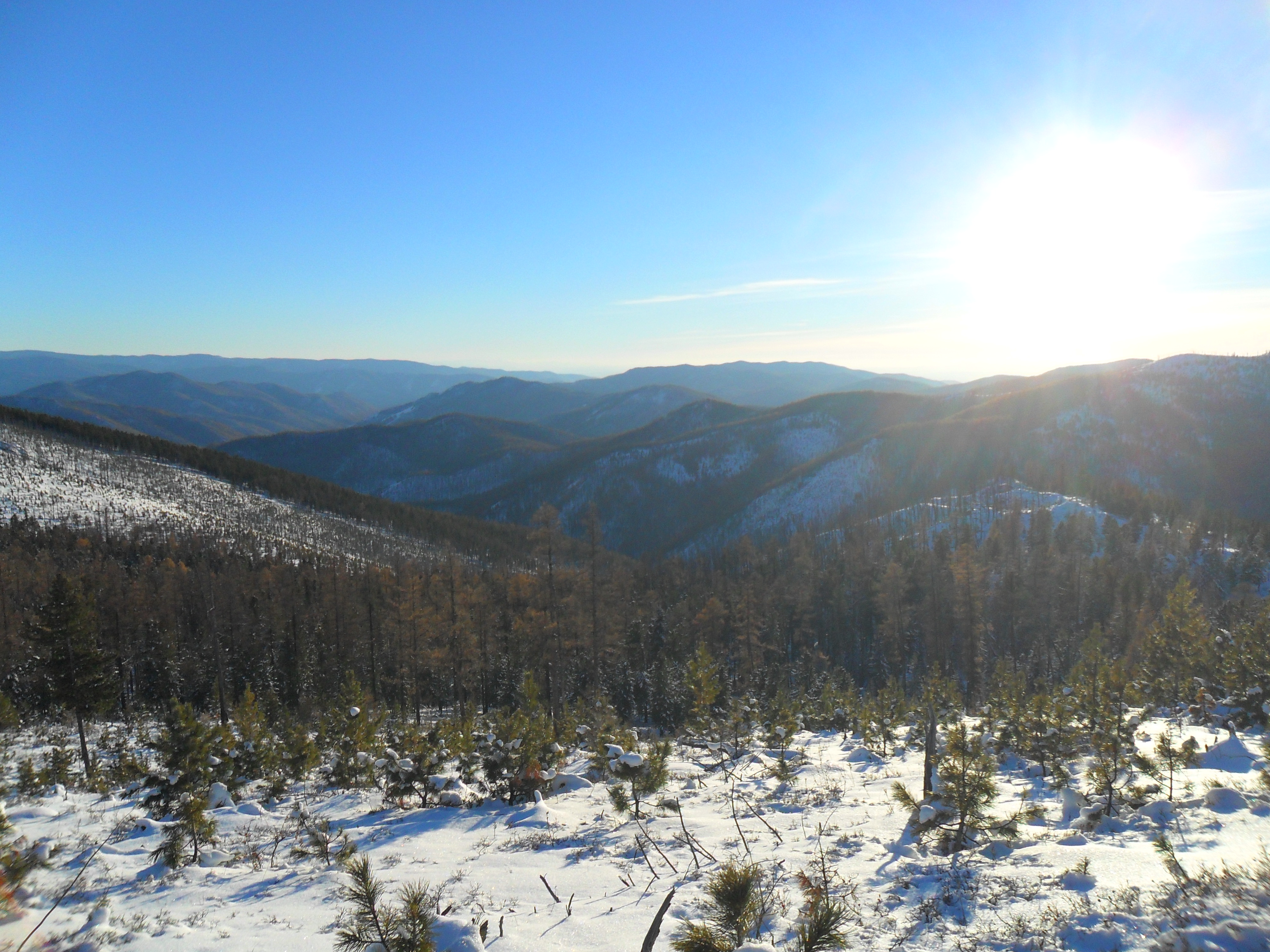 Тапсинский заказник: Восточная часть Кызылского кожууна,Кызылский кожуун, Тува This image is related to the protected area of Russia number 1710023